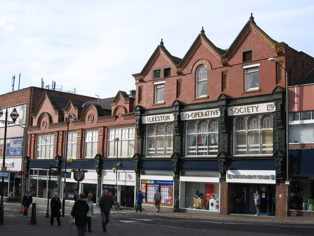 Ilkeston - Co-op